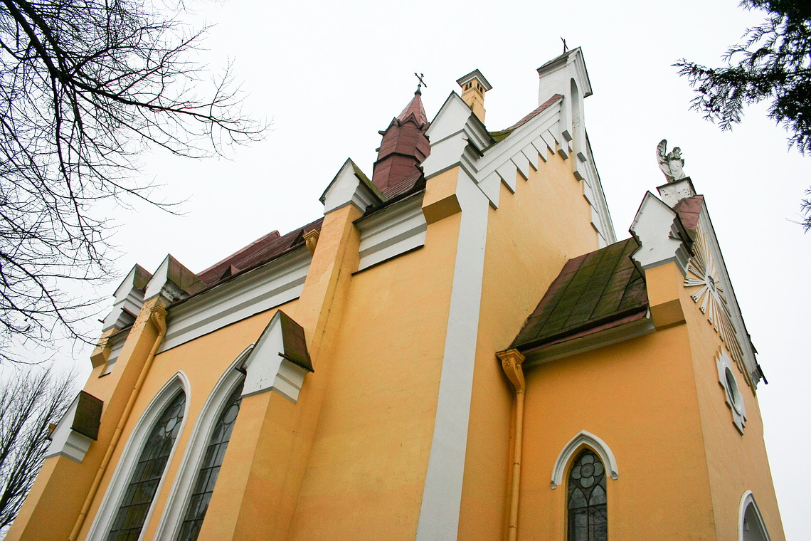 Apvaizdos bažnyčia Vilniuje